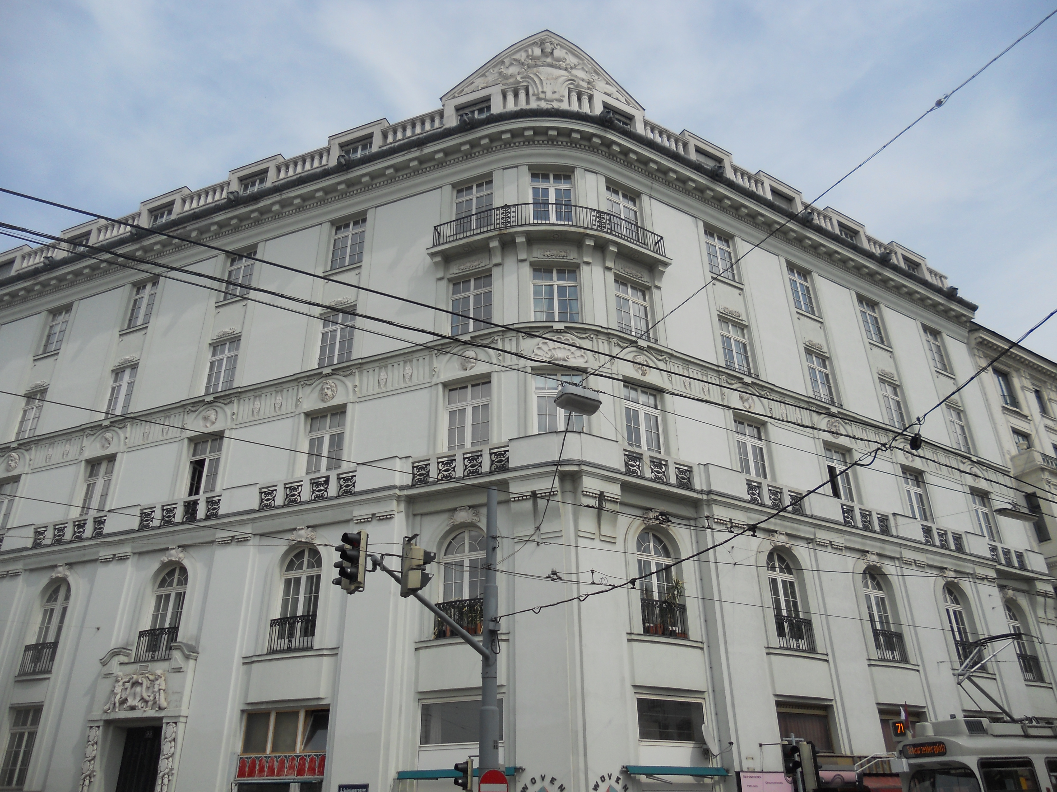 Haus Salesianergasse 33 in Wien, ehemaliges Wohnhaus Josef Hoffmanns